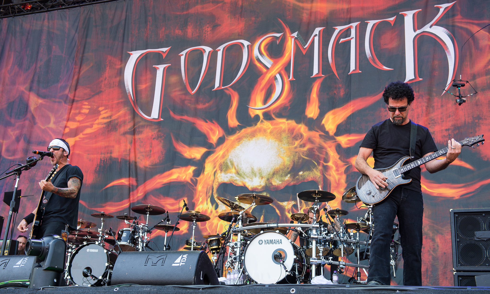 ARGO-Konzerte,Beck's Park Stage,Festival,Godsmack,James Shannon Larkin,Konzert,Livekonzert,Livemusik,Musik,RiP,Rock im Park 2015,Salvatore Paul Erna,Shannon Larkin,Sully Erna,Tony Rombola